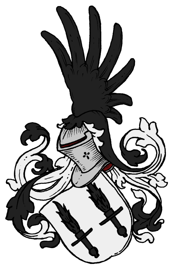 Wappen derer von Verschuer